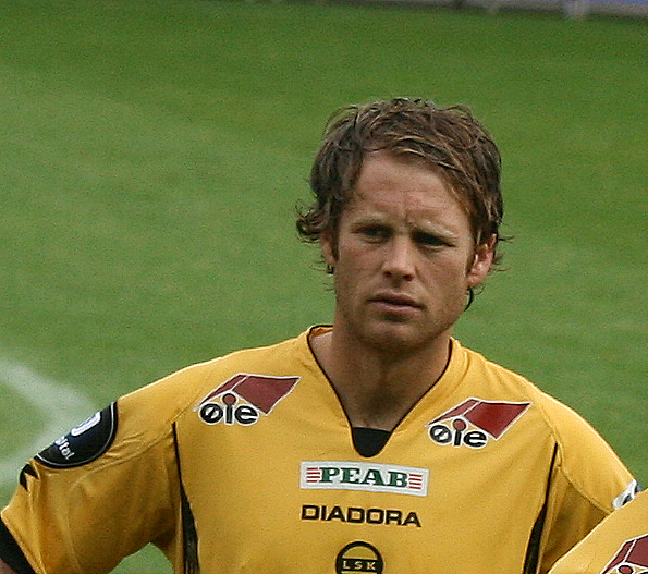 Simen Brenne